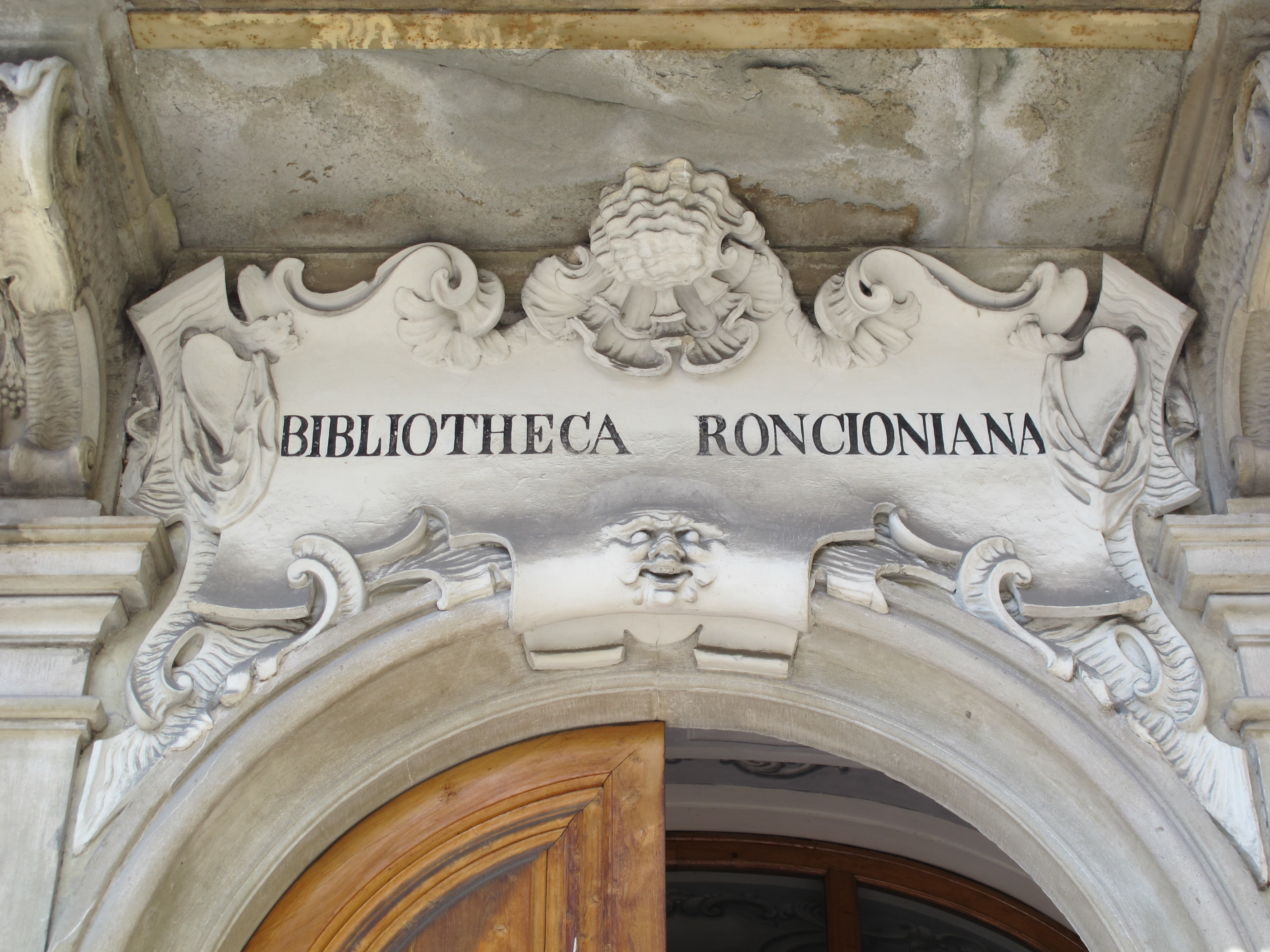 Prato, entrata biblioteca roncioniana